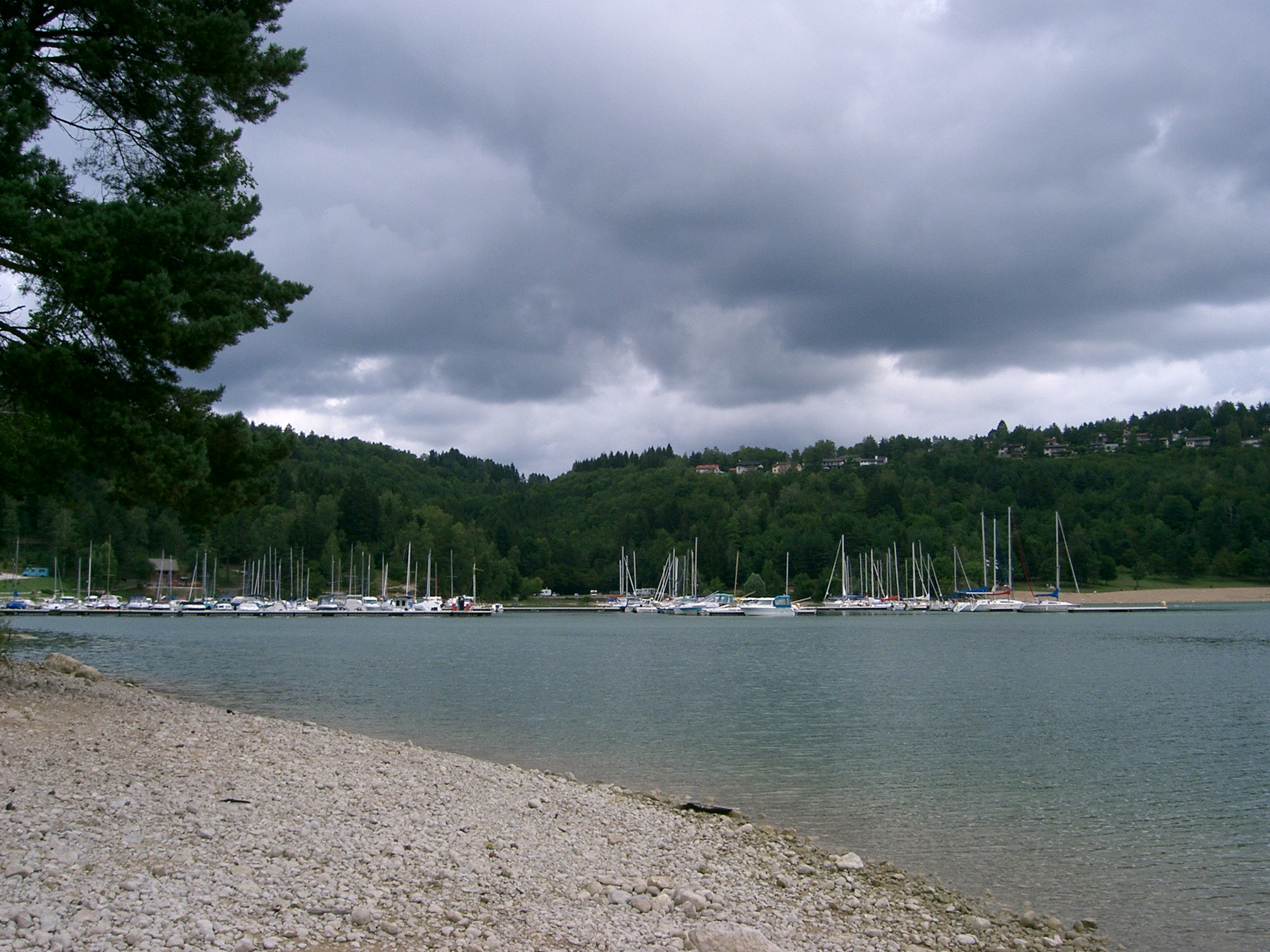 Maisod (Jura - France) - base nautique sur le lac de Vouglans